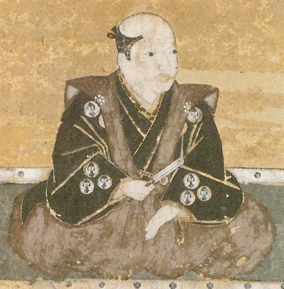 南部政直の肖像。